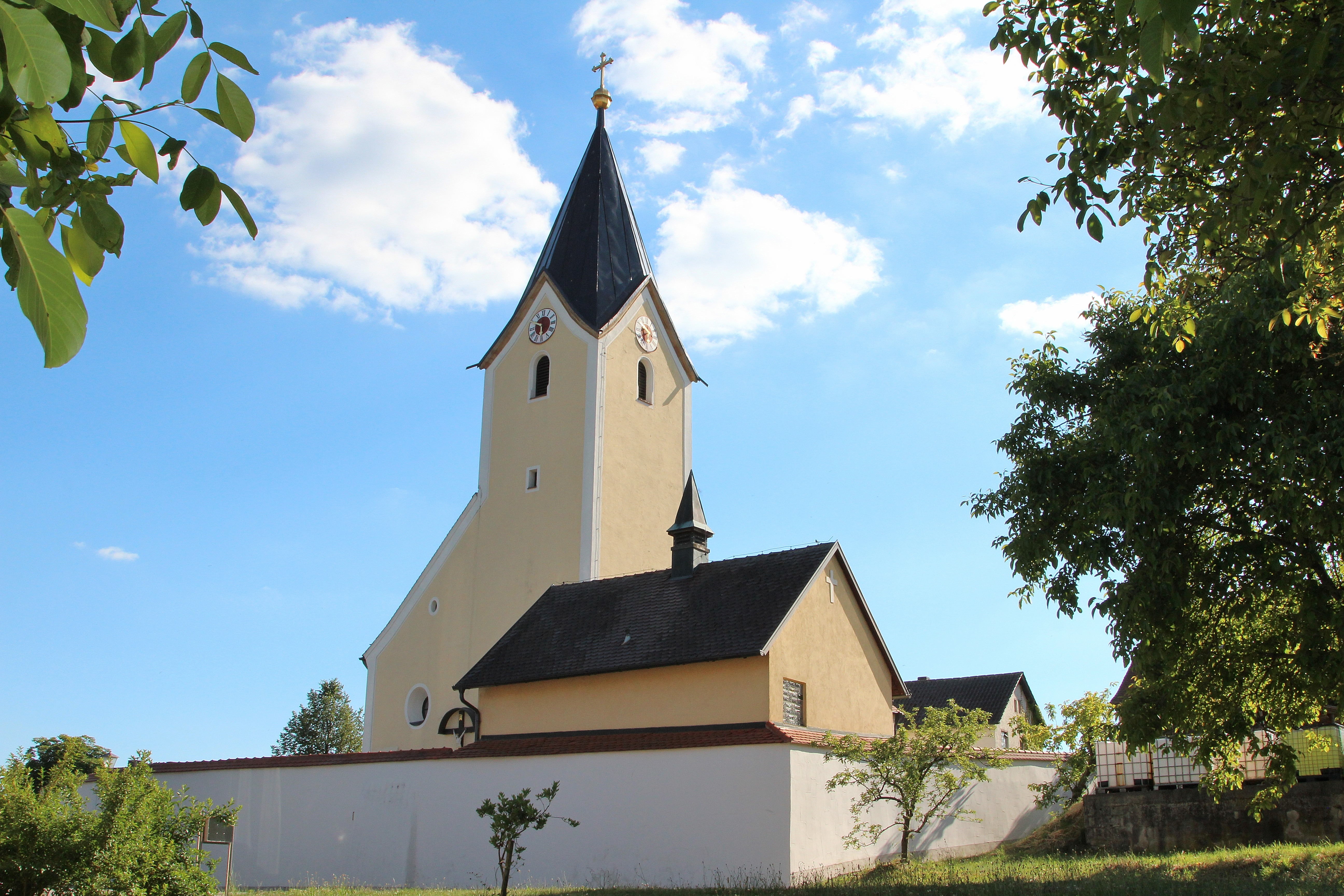 St. Peter und Paul, Fuhrn; Stadt Neunburg vorm Wald, Landkreis Schwandorf, Oberpfalz, Bayern